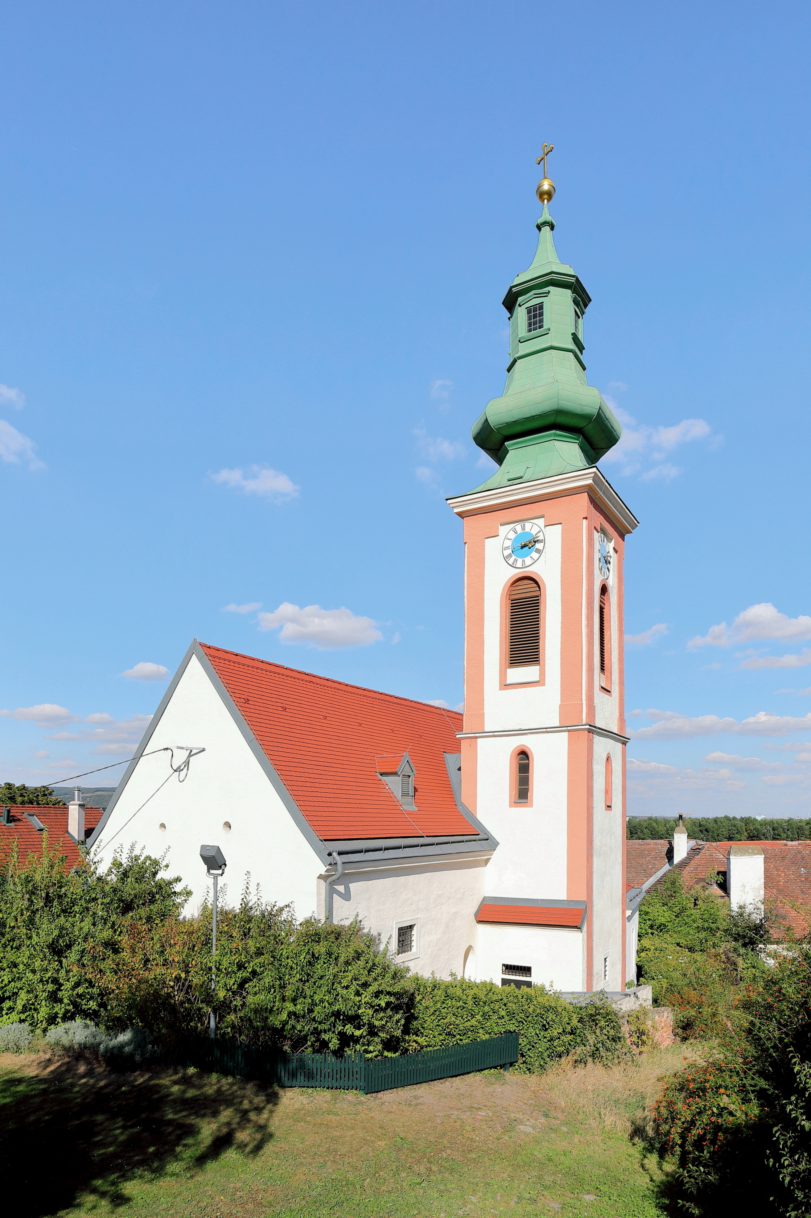 Die Südwestansicht der Kahlenbergerdorfer Pfarrkirche im 19. Wiener Gemeindebezirk Döbling.